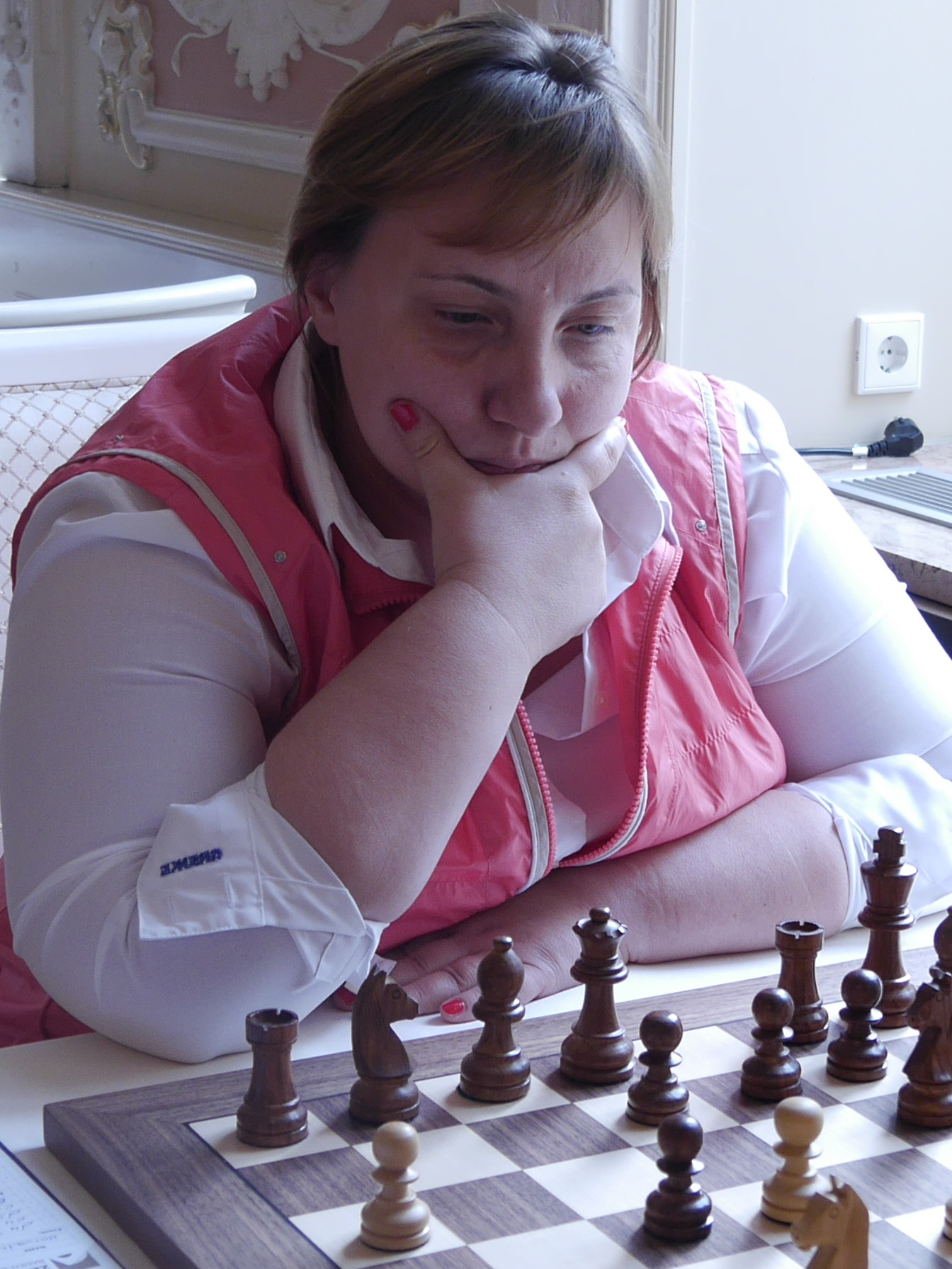 Ekaterina Kovalevskaya, Schachbundesliga der Frauen 2016/17 in Baden-Baden.